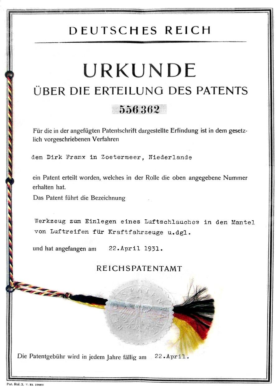 Octrooi (patent) verleend aan Dirk Franx in Zoetermeer op 22 april 1931 voor een werktuig om binnenbanden te verwisselen. [1]